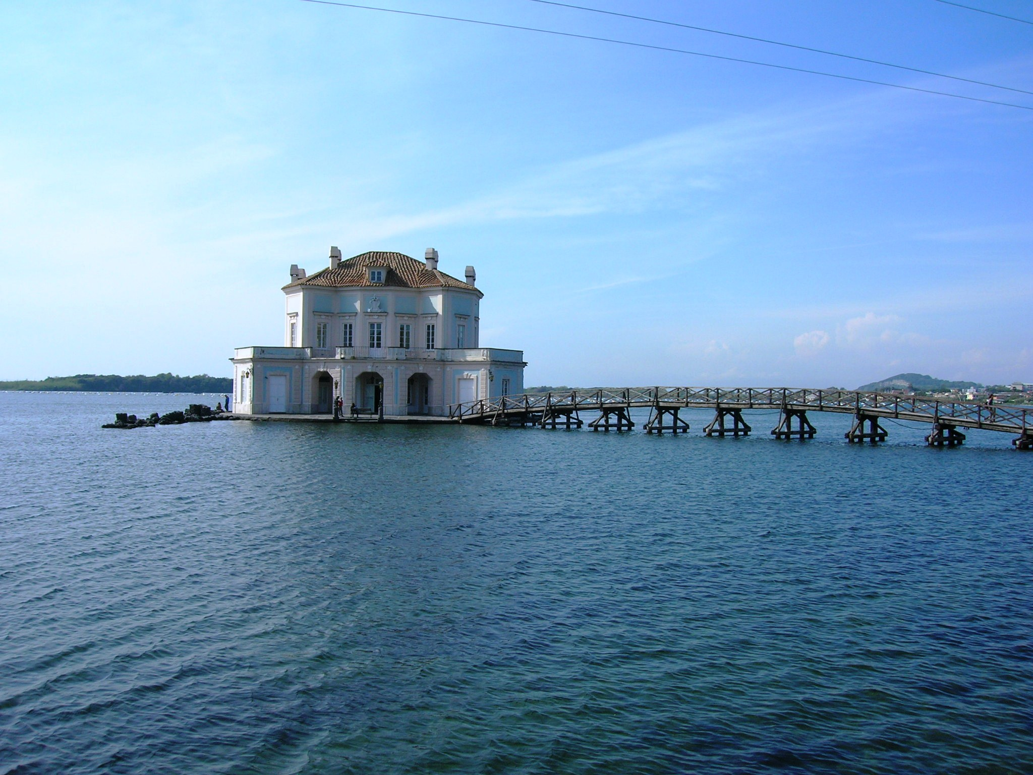 La Casina Vanvitelliana sul lago Fusaro